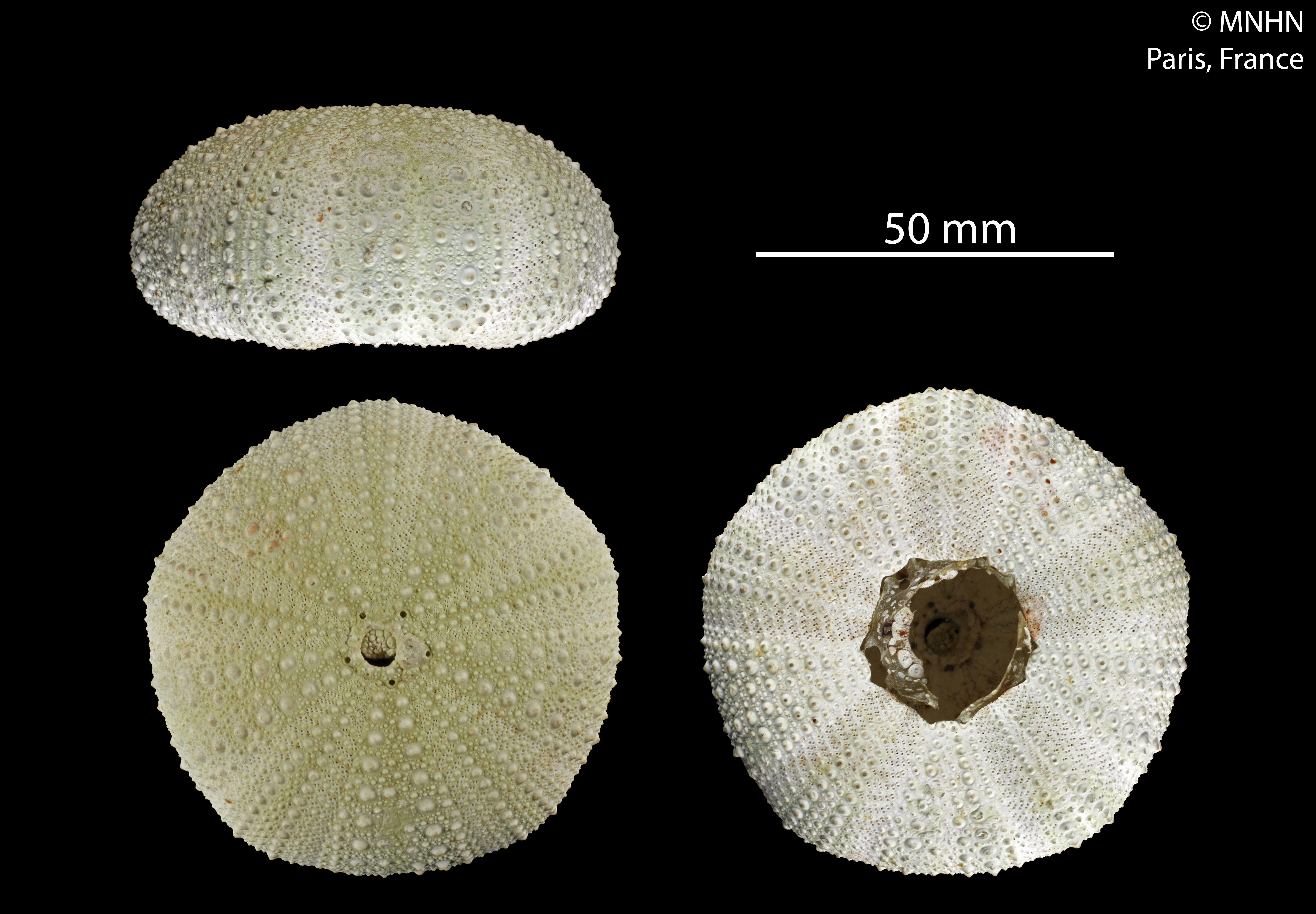 Strongylocentrotus pallidusSpécimen MNHN-IE-2013-10439, sous la dénomination Loxechinus violaceus Perrier, 1875Collection : Échinodermes (IE)Muséum National d'Histoire Naturelle (Paris, France) Origine : Libellé du pays : MER DE BERING Localité/Lieu-dit : Îles Aléoutiennes Nom du collecteur : Agassiz A.. & Clark H.L. Navire : Albatros